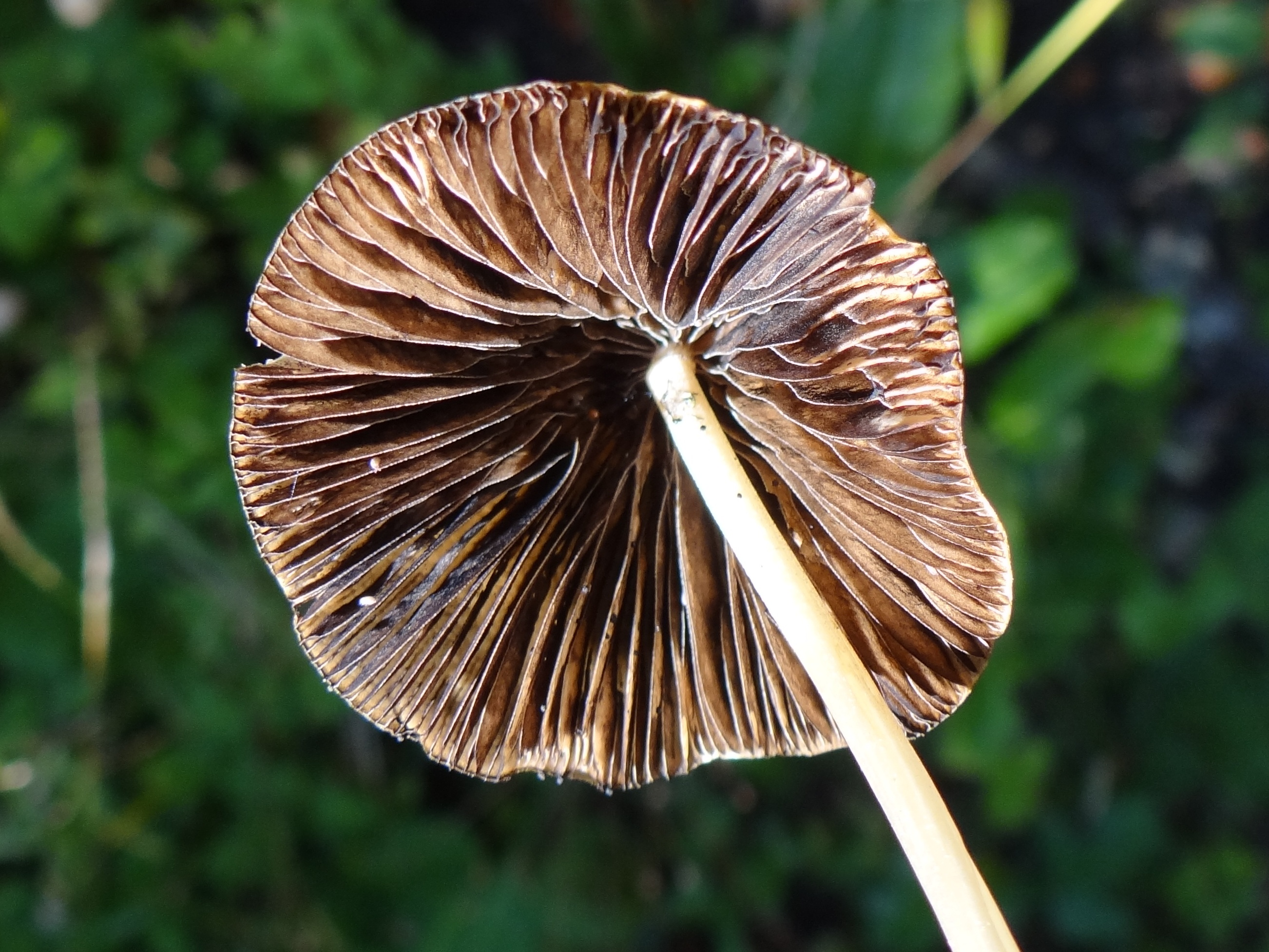 Panaeolina foenisecii (location: Poland, Leszczyna, województwo małopolskie)